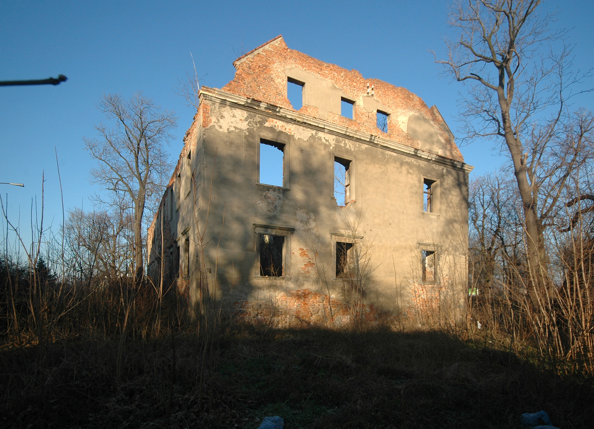 Pałac (ruina) i spichlerz Grębocice, Grębocice